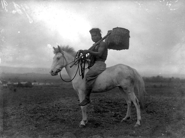 Negatief. Batakse man te paard